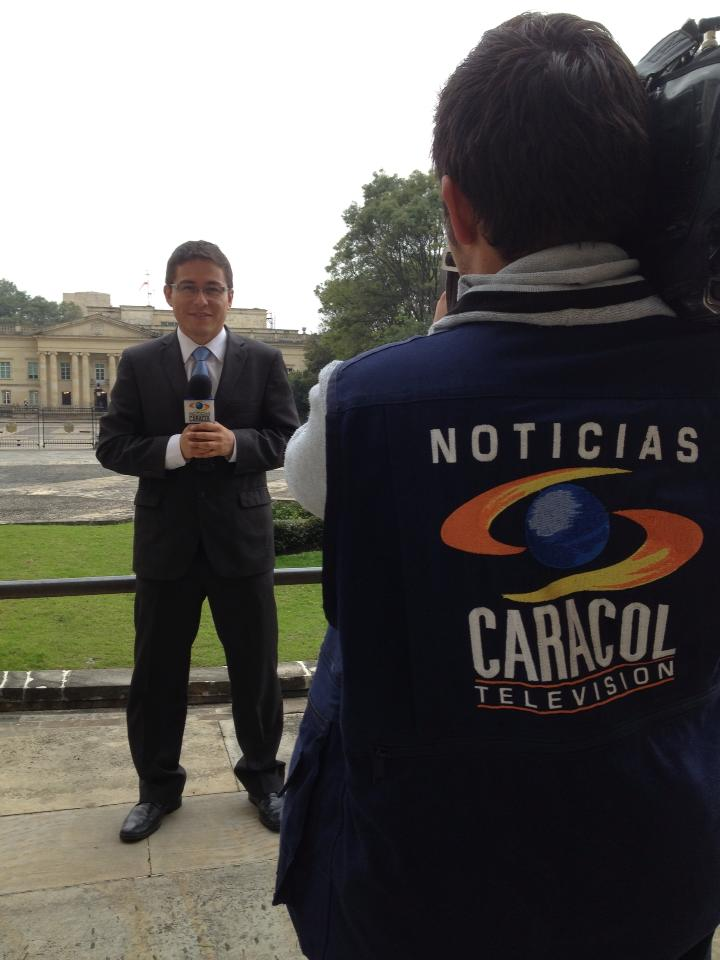 Trabajó en el Noticias Caracol entre 2011 y 2013.